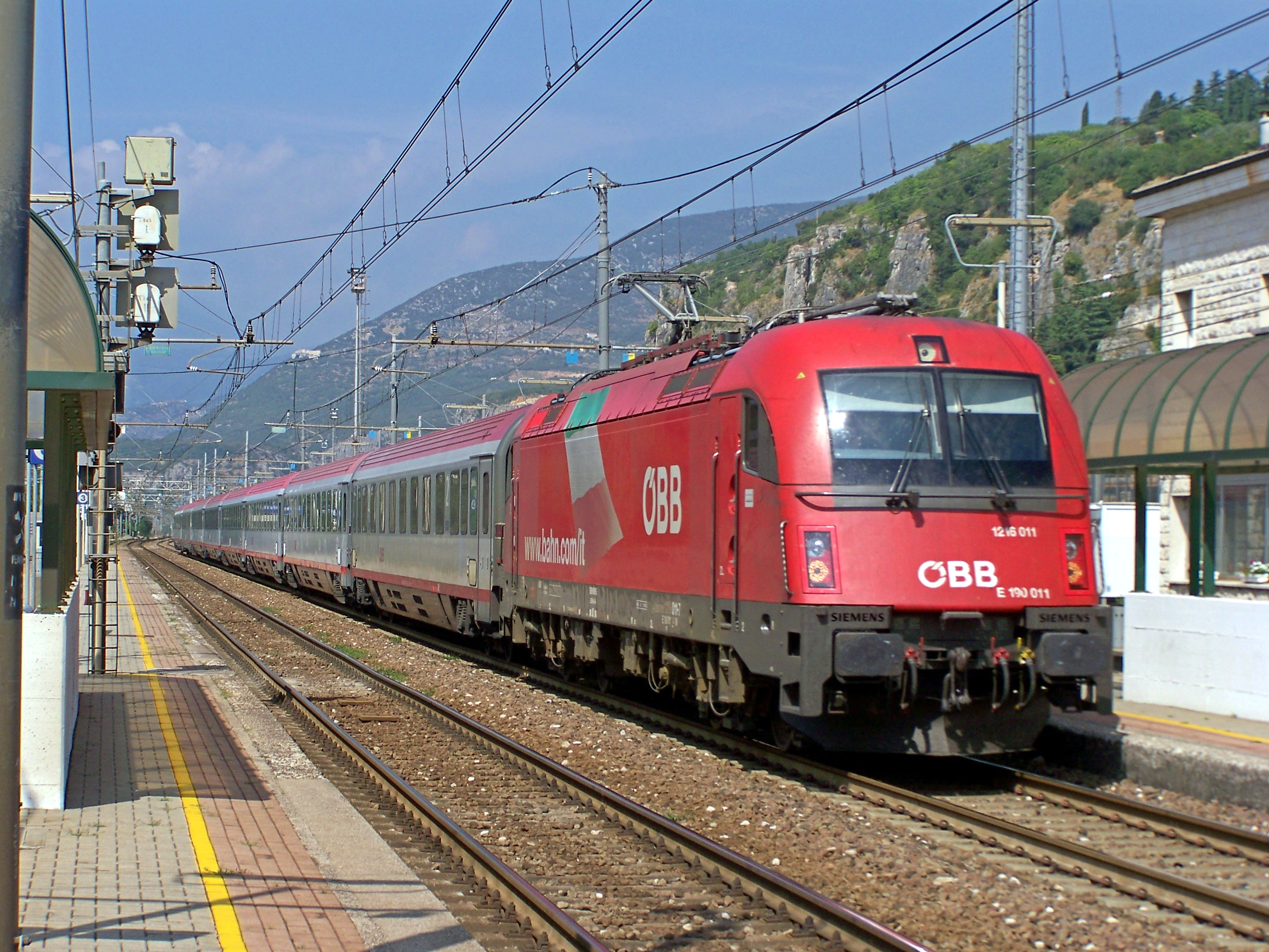 L’Eurocity 85 Monaco di Baviera–Bologna Centrale in transito presso la stazione di Domegliara-Sant’Ambrogio trainato dalla ÖBB 1216.011